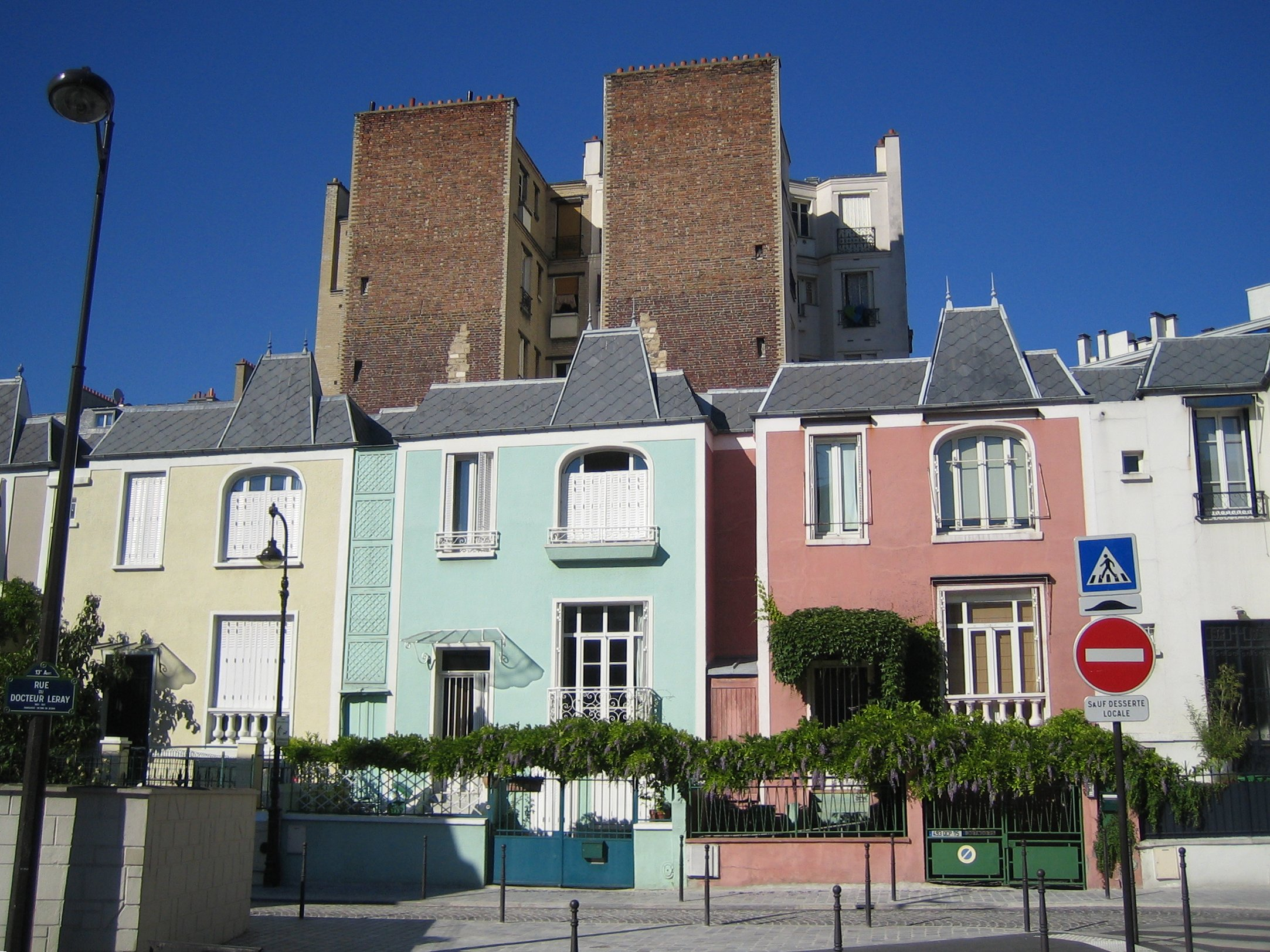 Paris, rue Dieulafoy (Maison-Blanche). Photo prise depuis la rue du Docteur-Leray, ce que montre la plaque de rue à gauche.